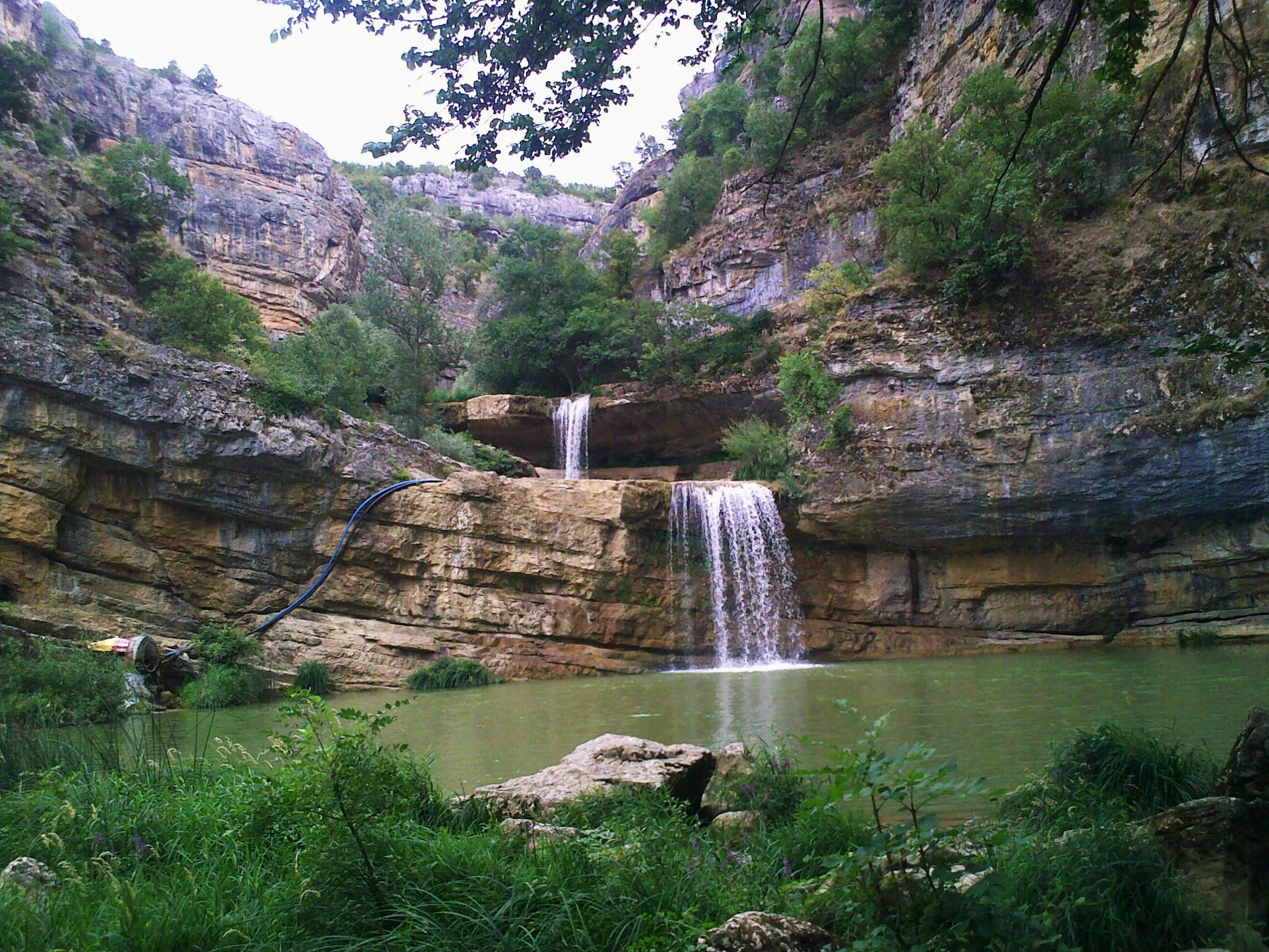 Mirusha, Kosovo